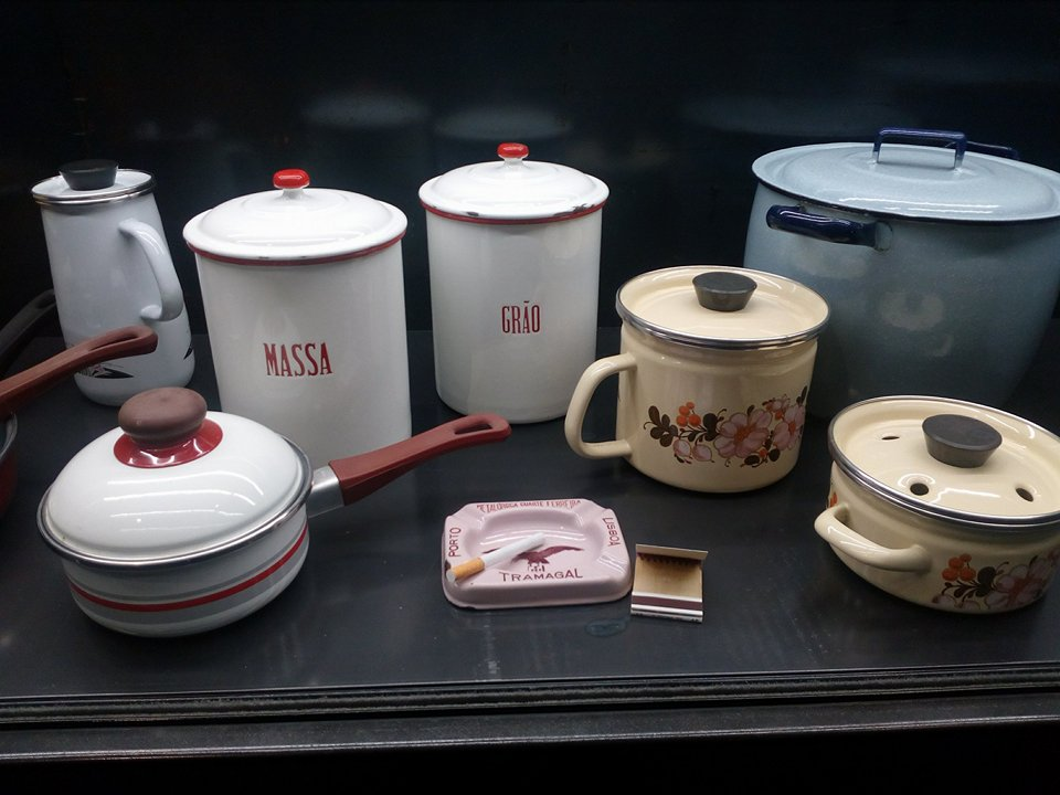 Loiça fabricada na filial da Metalúrgica Duarte Ferreira no Porto (antiga Fábrica de esmaltagem Águia)